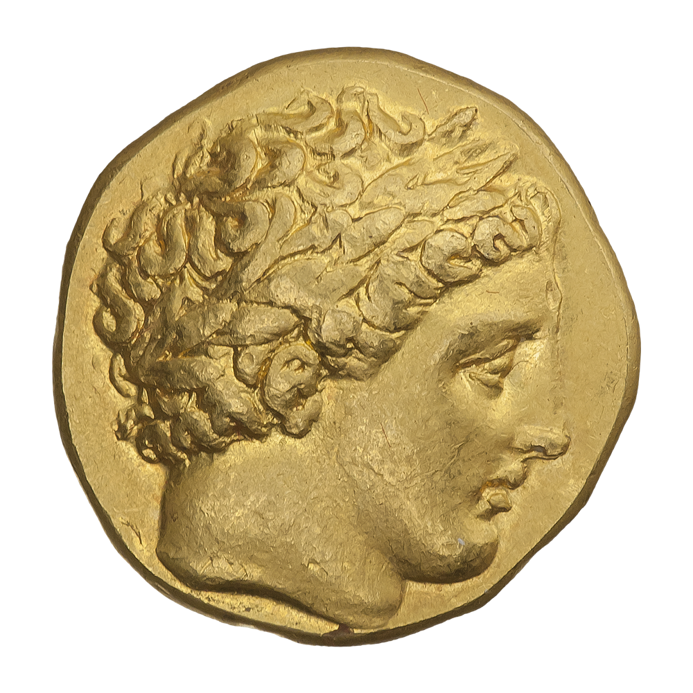 Македонское царство. Пелла. Филипп II (359—336 гг. до н.э.). Статер. Чеканка после 328 г. до н.э. Аверс. Голова Аполлона в лавровом венке.